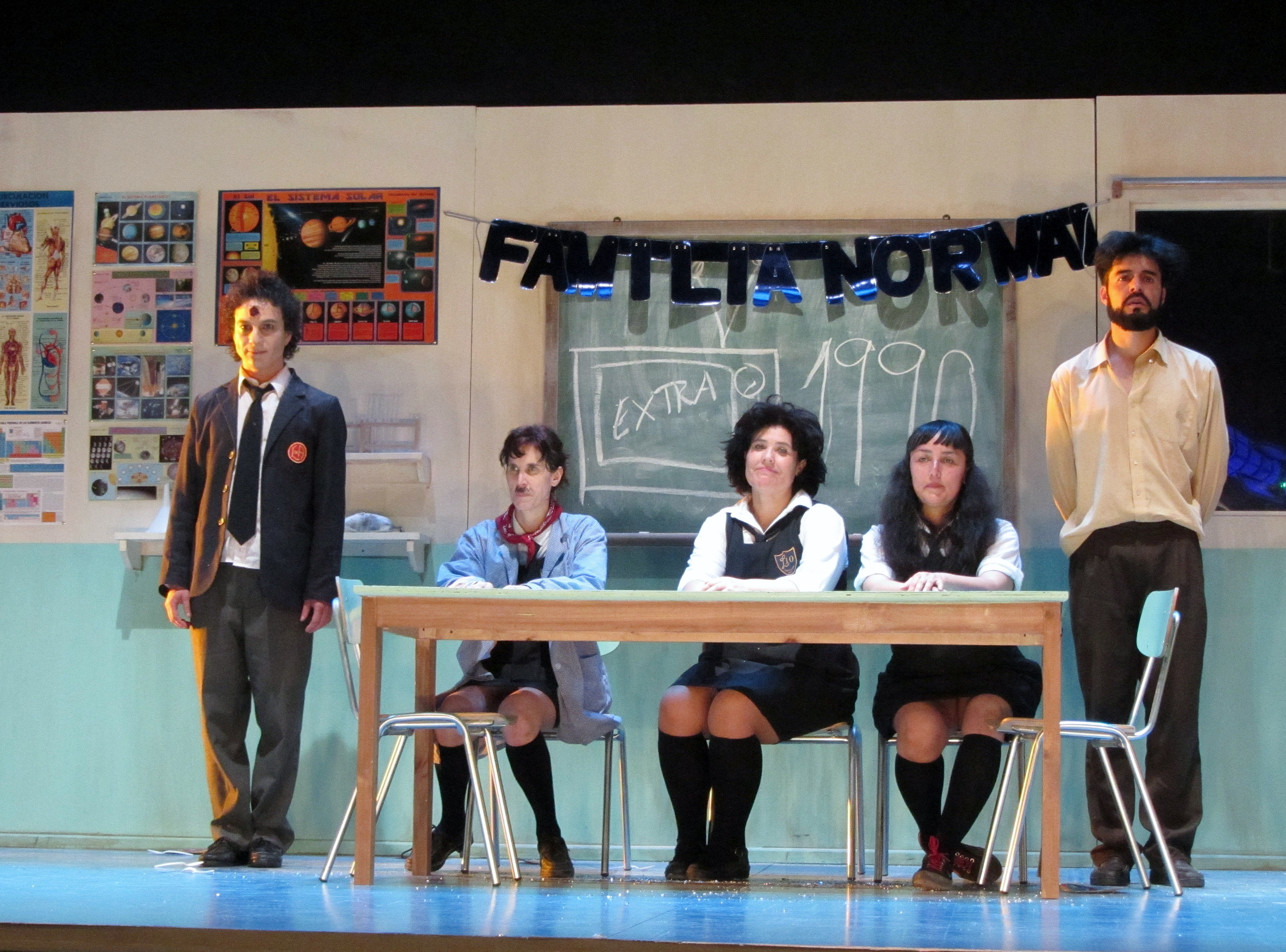 Saludo de los actores al final de pieza Liceo de niñas de la escritora y actriz chilena Nona Fernández, 2015-12-09 compañía Pieza Oscura en el Teatro de la Universidad Católica, con de Marcelo Leonart y la actuación, entre otros, de la autora